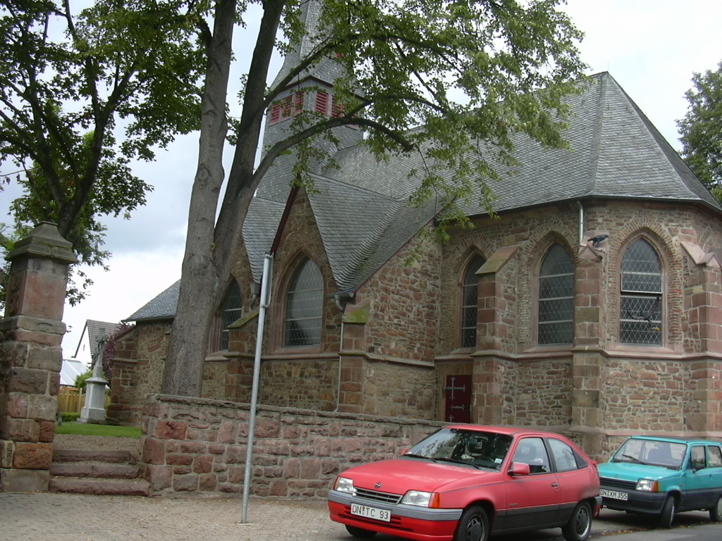 Niederau (Düren, alte Kirche own work papa1234 2006-08-12